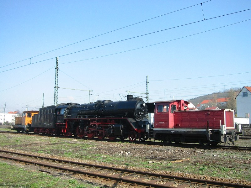 Rangierlokomotive 321 200 im Einsatz.